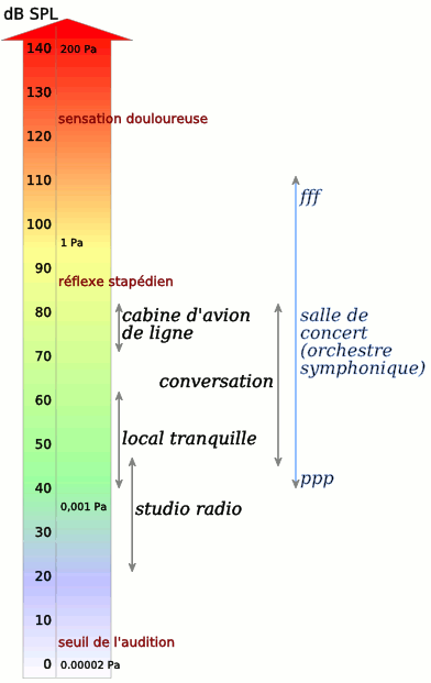 échelle des niveaux sonores dB SPL; version png de File:Sound levels.svg